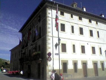 Imagen del Ayuntamiento de Villava-Atarrabia (Navarra)en la que se aprecia la Ikurriña (bandera vasca) colocada por el propio Ayuntamiento de la localidad navarra en un mastil a escasos metros de la casa consistorial a la misma altura de las banderas oficiales. En dicha población anteriormente se había realizado un referendum que posibilitó su colocación junto con las enseñas oficiales (localidad, comunidad, España, Europa). Tras la aprobacion de la Ley de Símbolos en Navarra su uso en los edificios públicos no está permitido, por lo que algunas localidades navarras la situan en un mastil cercano al Ayuntamiento como expresión de su iodentidad. Tras las elecciones municipales de mayo de 2007 que propiciaron un cambio de gobierno en Villava-Atarrabia, el nuevo Ayuntamiento formado por la coalición "Nafarroa Bai" colocó la "ikurriña" como se aprecia en la fotografía en Octubre de 2007. Por parte de UPN se anunció el inicio de acciones legales sin que hasta la fecha exista resolución sobre el particular.